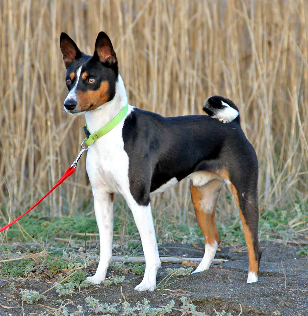 Basenji dog. Nuovo arrivo dall'America